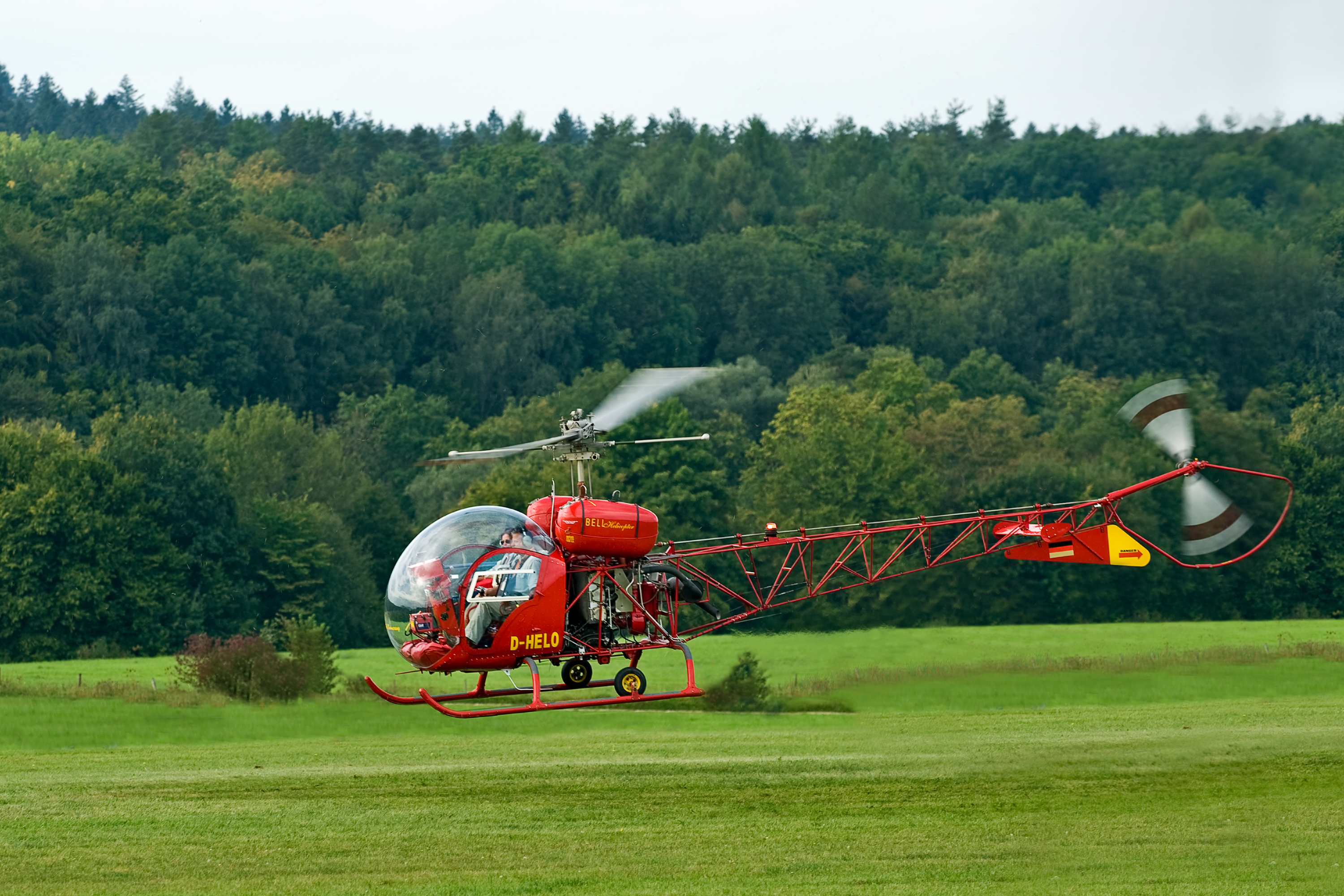 Helicopter Bell 47, fotografiert bei der "OTT" 2011. Am Flugfeld Hahnweide, Germany